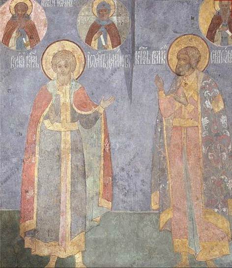 АРХАНГЕЛЬСКИЙ СОБОРСТЕНОПИСЬ НАДГРОБНЫЕ ПОРТРЕТЫ КНЯЗЕЙ Великие князья Иван Данилович Калита и Семен Иванович Гордый.